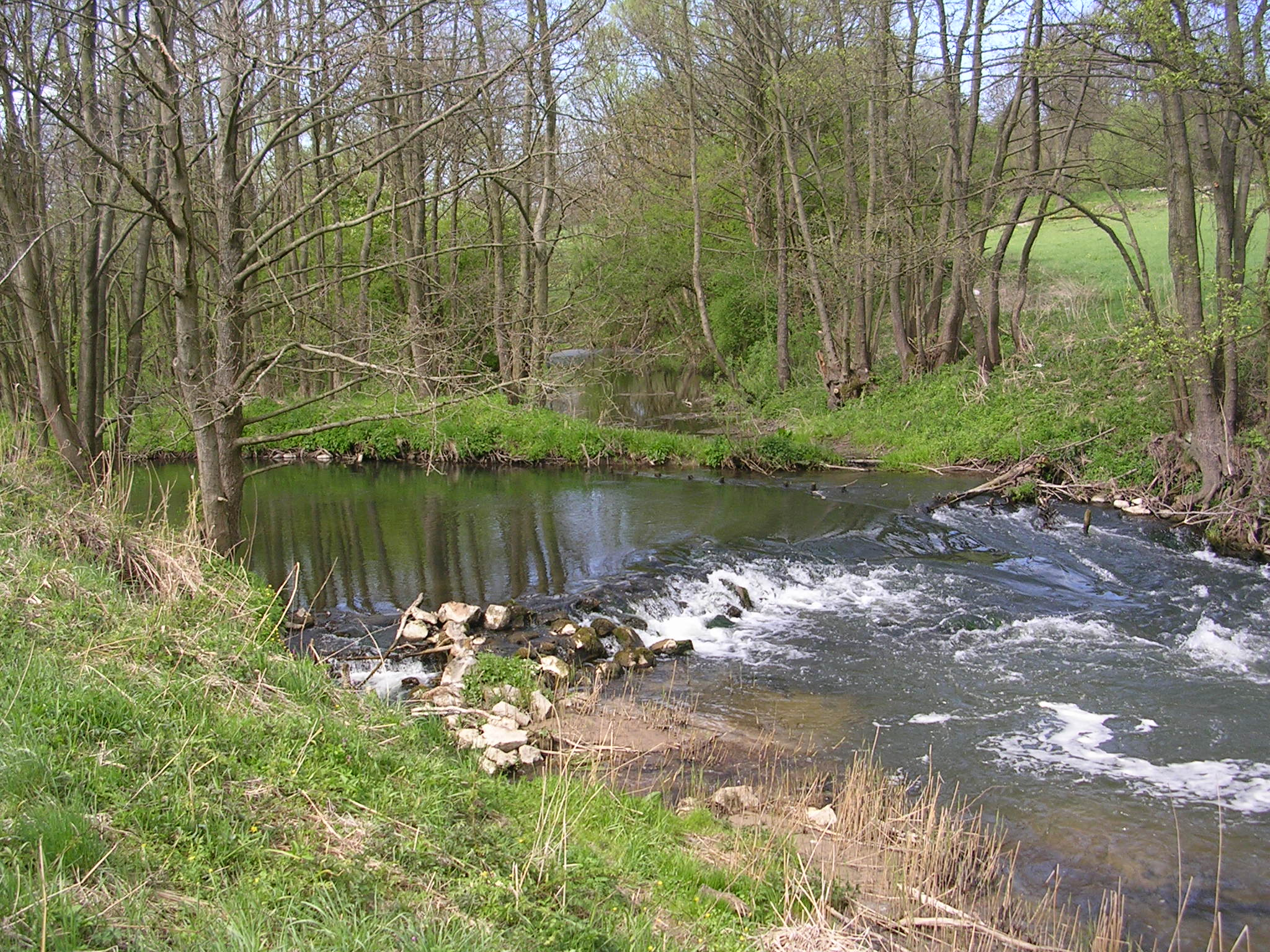 Radunia niedaleko wsi Lniska, Poland